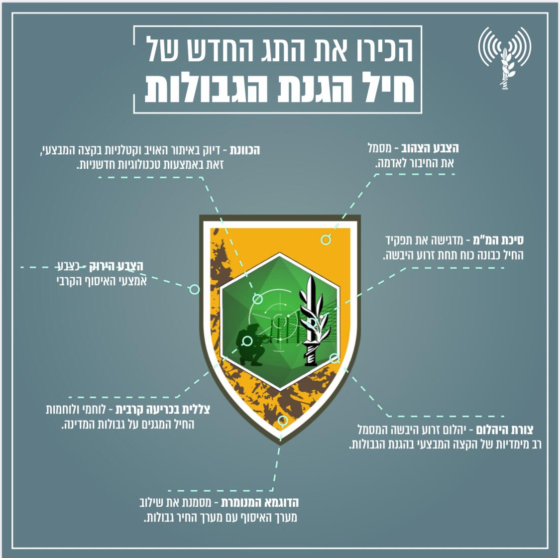 טקס חנוכת חיל הגנת הגבולות החדש בזרוע היבשה. הטקס התקיים במחנה עופר, וציין את המעבר הרשמי של מערך הגנת הגבולות לחיל חדש בזרוע היבשה. הטקס התקיים בראשות מפקד זרוע היבשה, אלוף יואל סטריק, ומפקד חיל הגנת הגבולות, תא״ל אמיר אבשטיין.